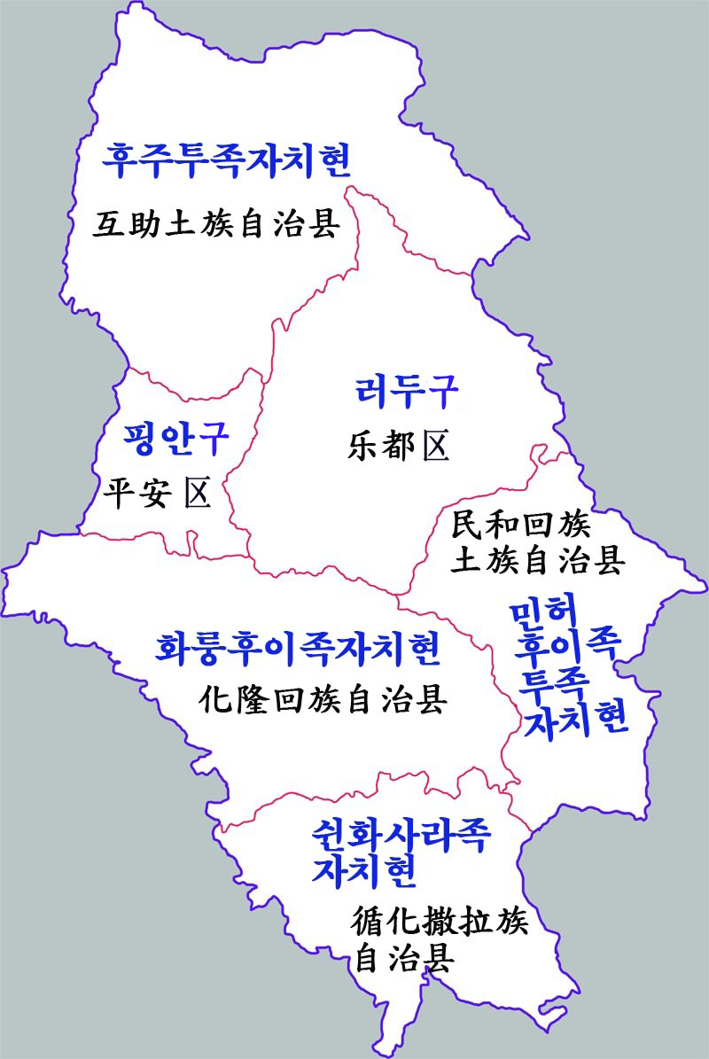 하이둥시 행정지도